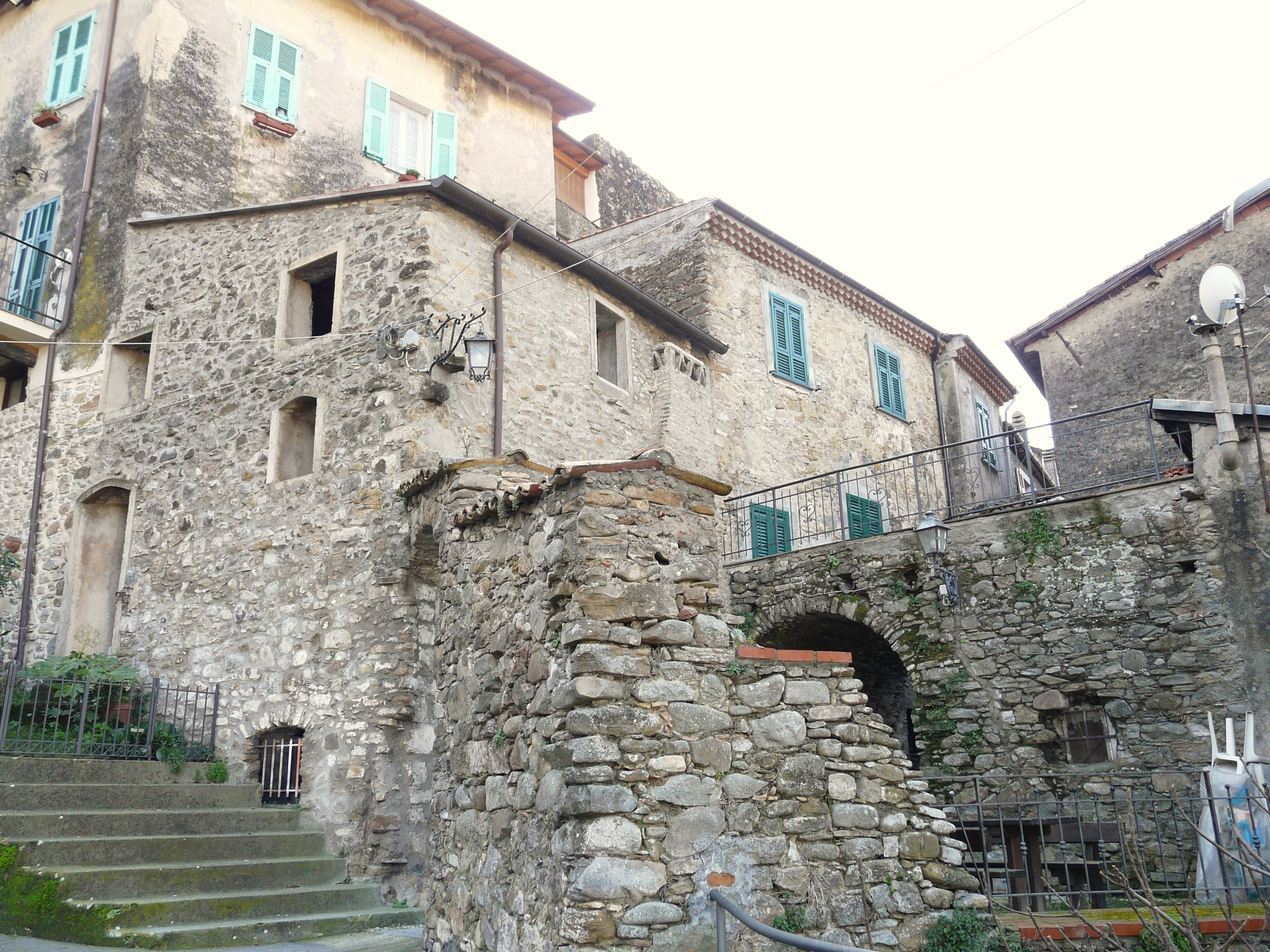 Vallecrosia Alta, Vallecrosia, Liguria, Italia